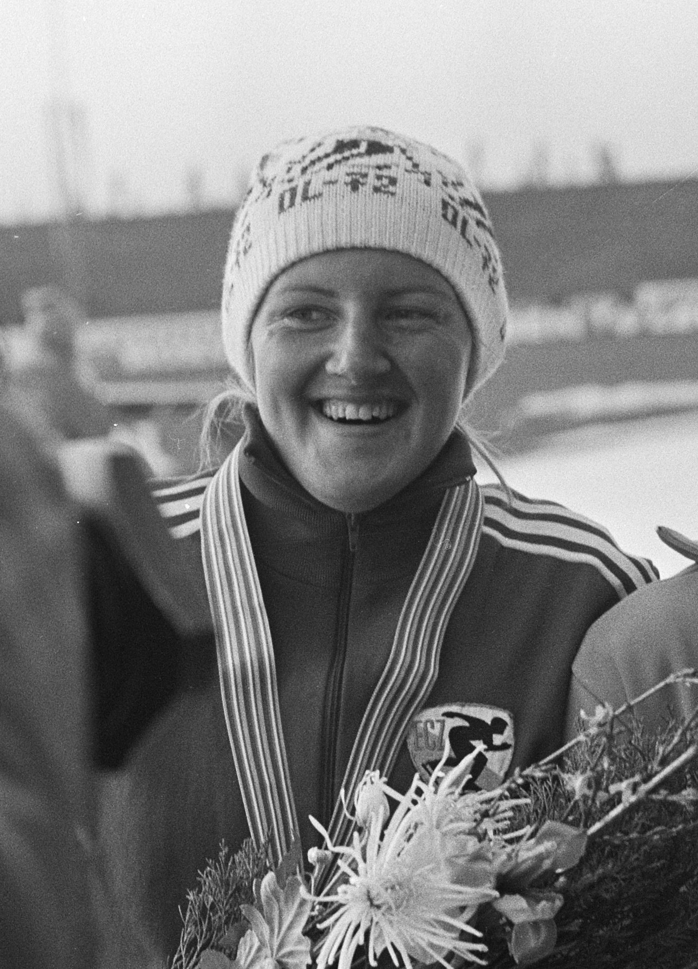 Erwina Ryś-Ferens, Wereldkampioenschappen, Assen